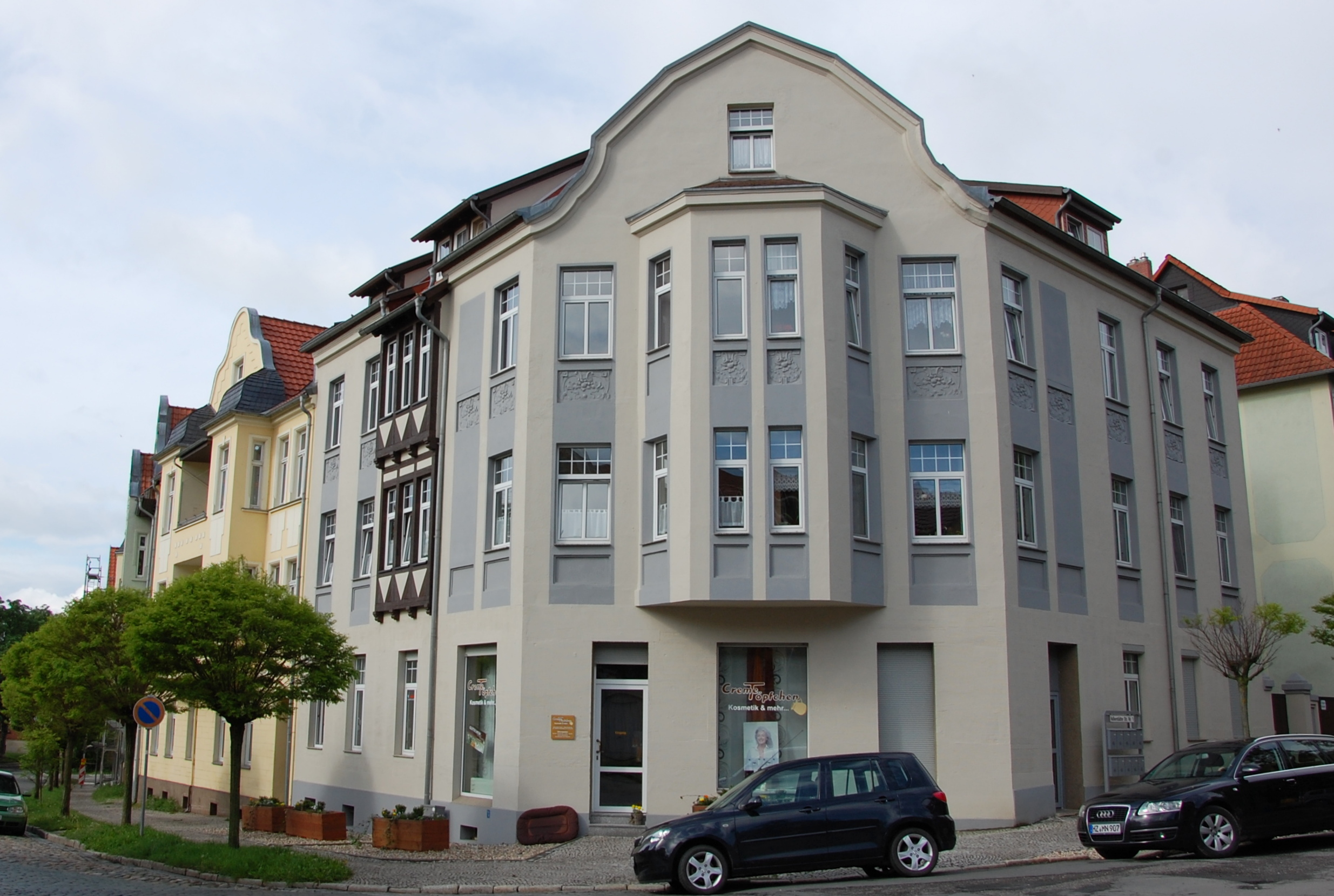 Haus Gröpern 15-18a, Halberstädter Straße 1 in Quedlinburg